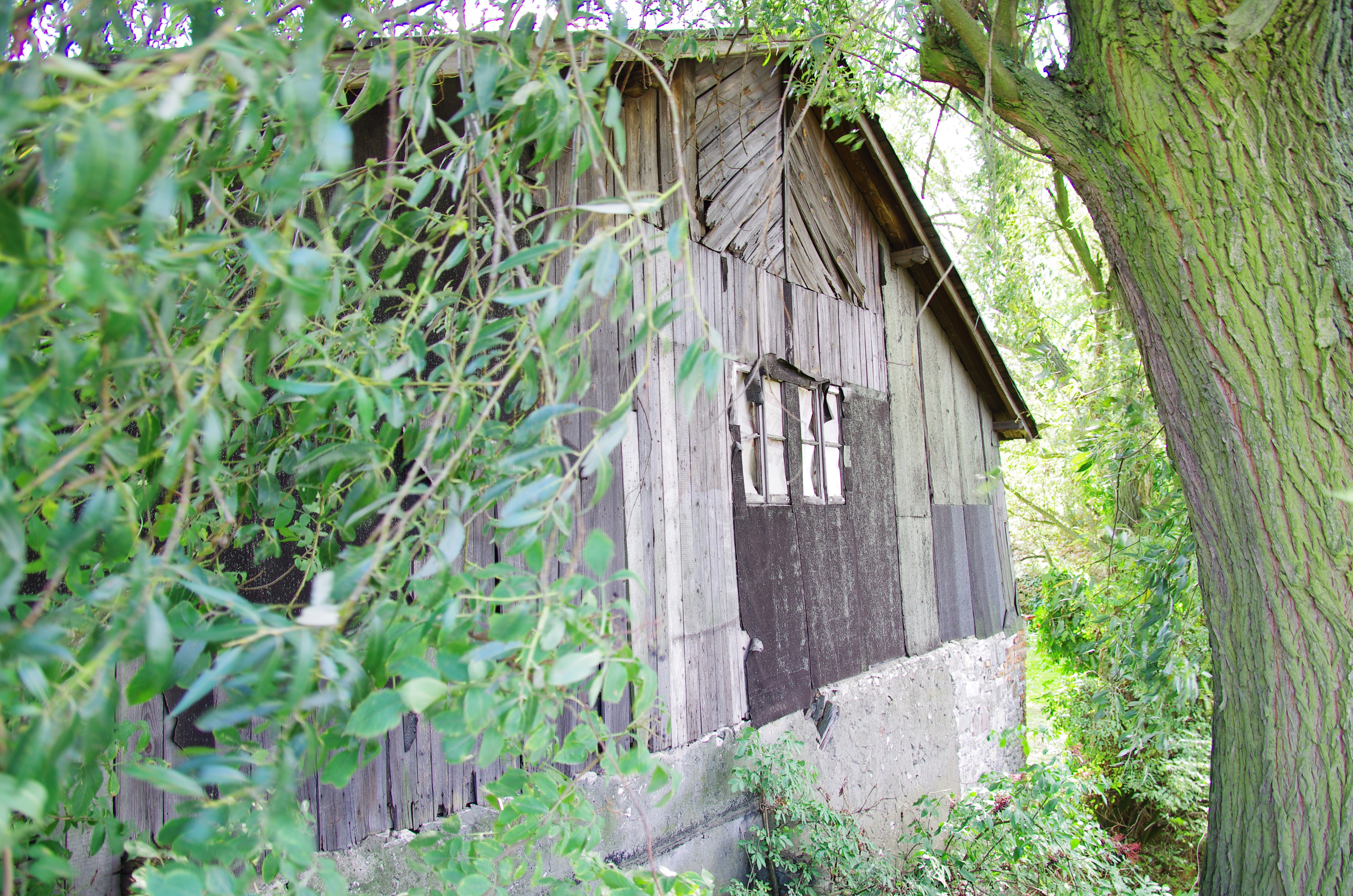 Dąbrowa Górnicza Ratanice - młyn wodny z XVIII w. (zabytek nr A 524/57 z 2.05.1957)